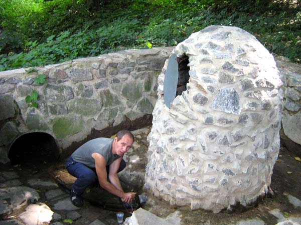 Краснокутський_дендропарк: Краснокутський_дендропарк_джерело